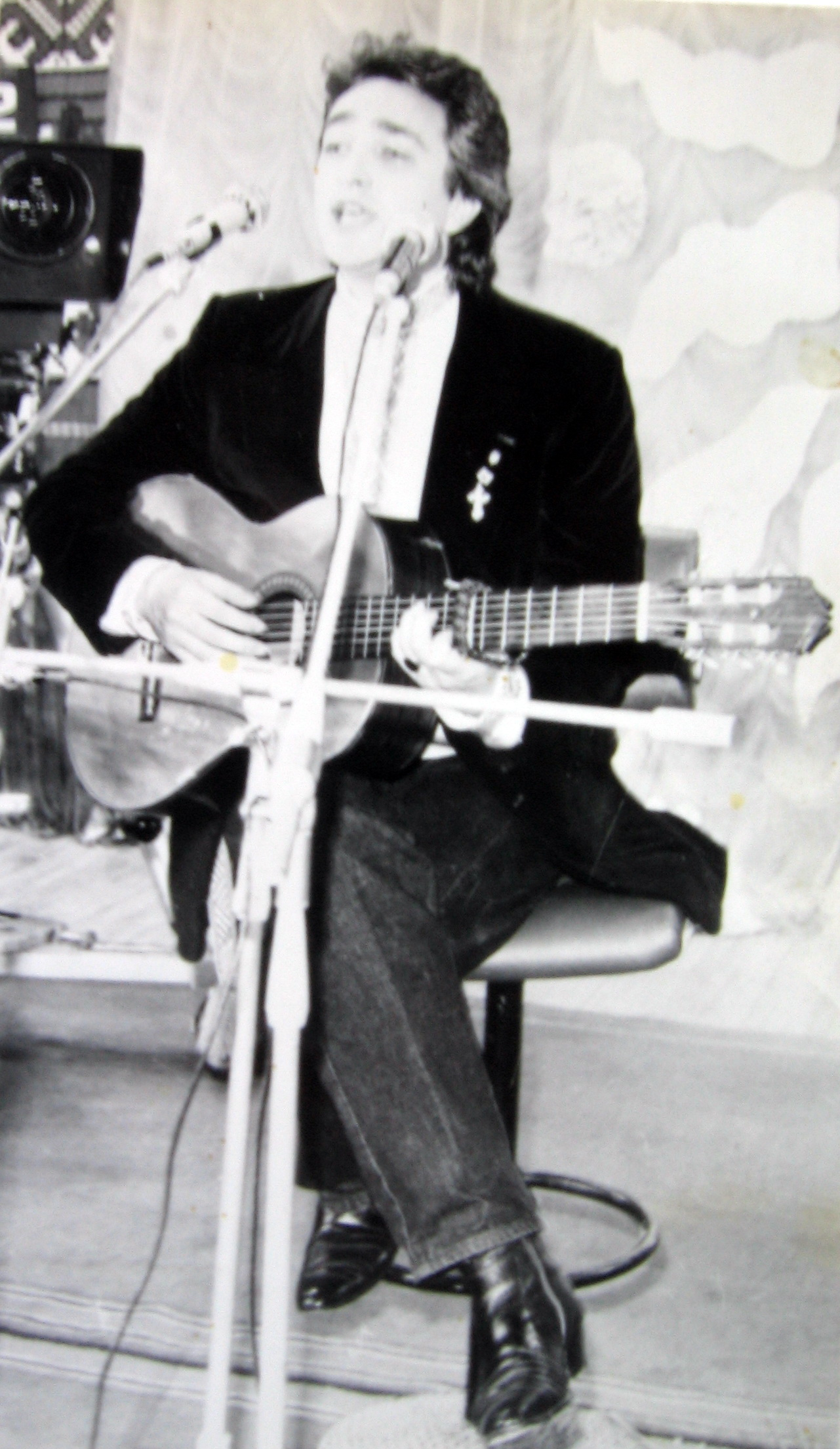 Беларуская (тарашкевіца): Сьпявак Данчык. Канцэрт у менскiм Палацы Прафсаюзаў